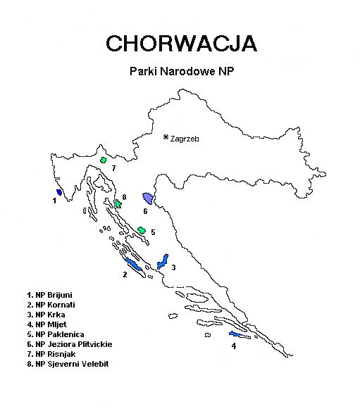 Parki Narodowe w Chorwacji - mapa.